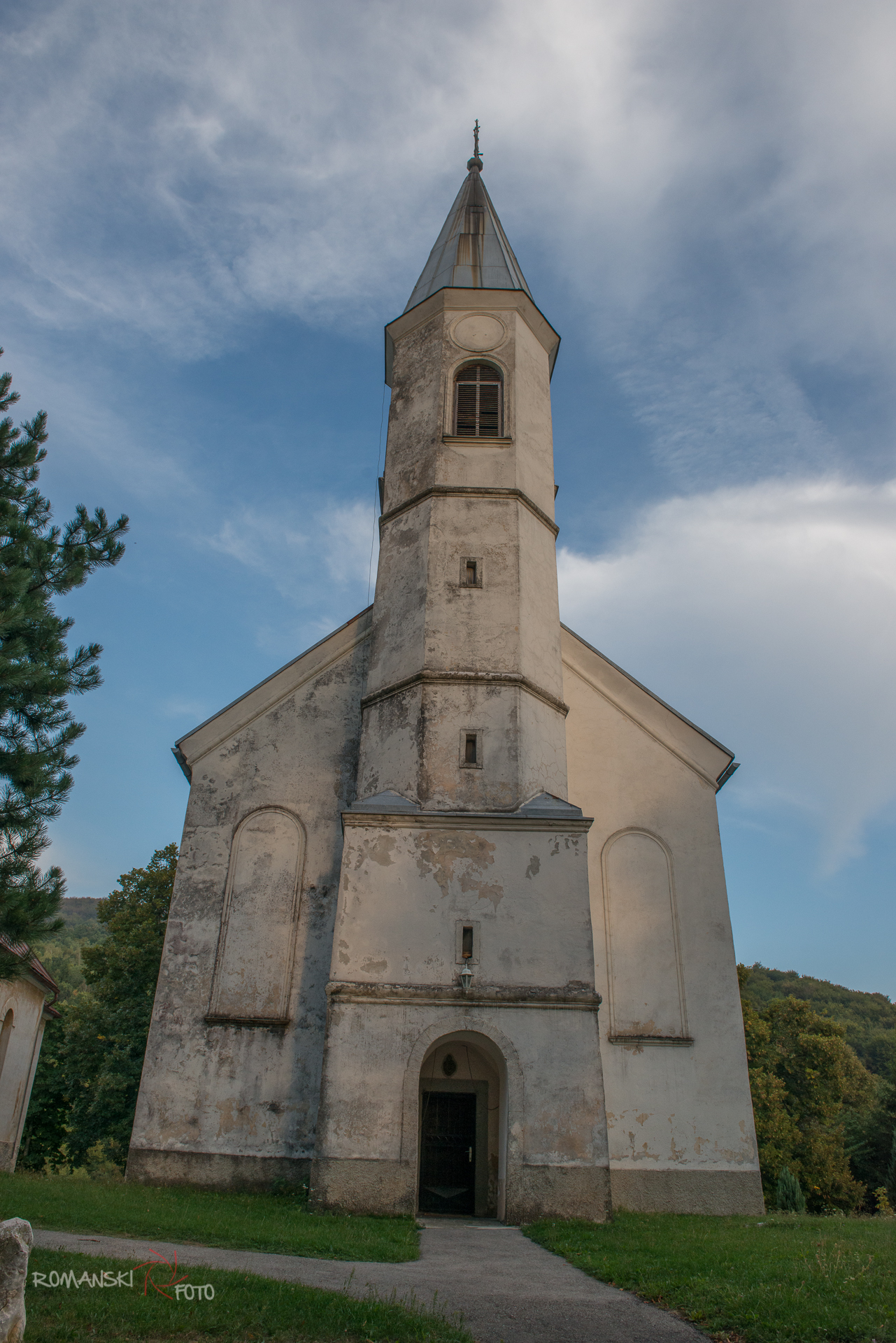 Sošice